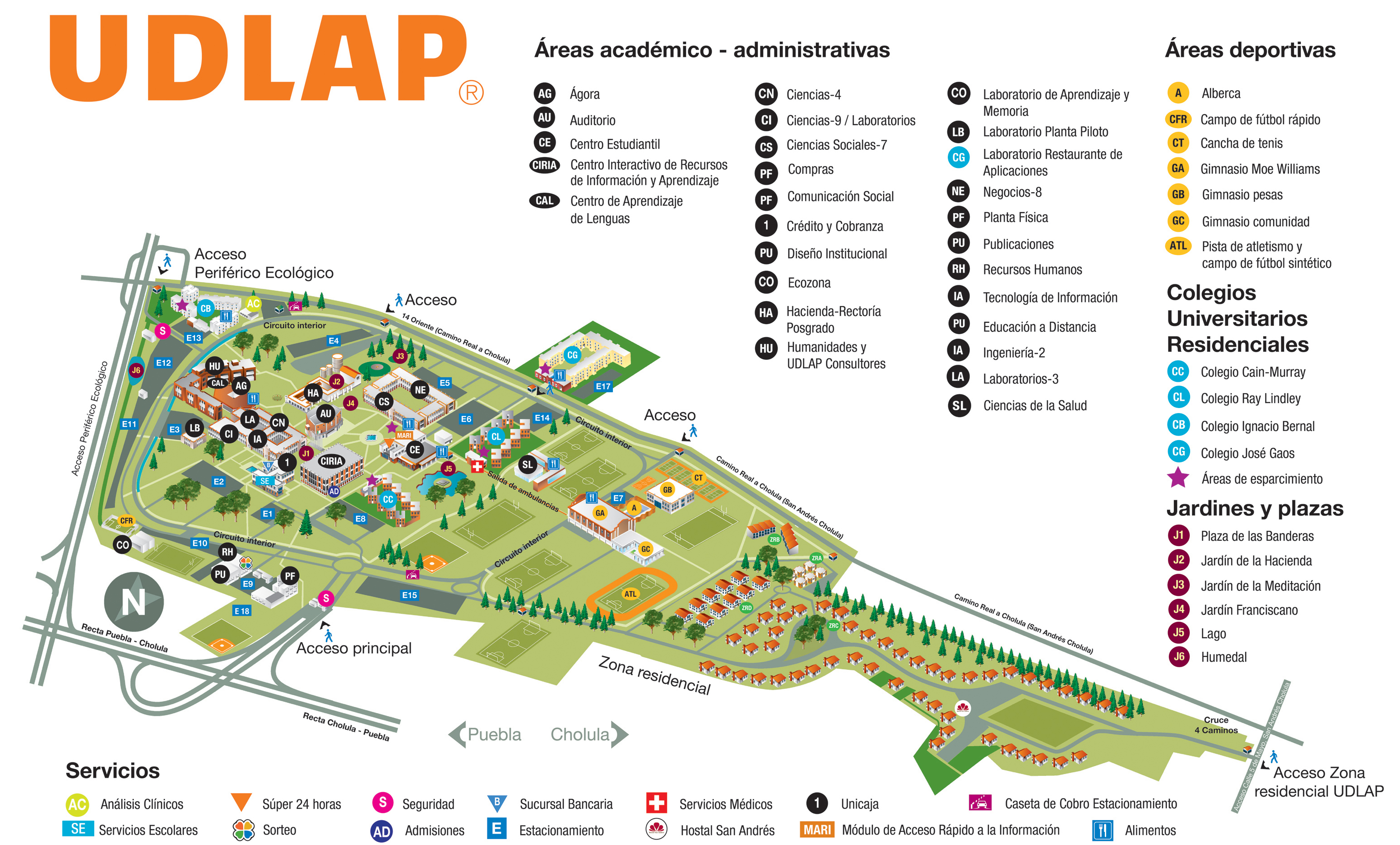 Mapa de las áreas limitadas por el circuito de la UDLAP